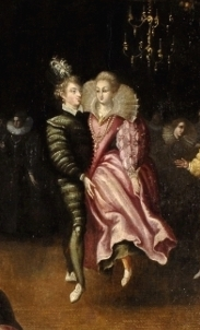 Particolare di un quadro del XVI secolo, "Ballo ha la corte", rappresentante una volta ballata nella corte di Enrico III